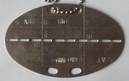 Foto der Rückseite der Erkennungsmarke